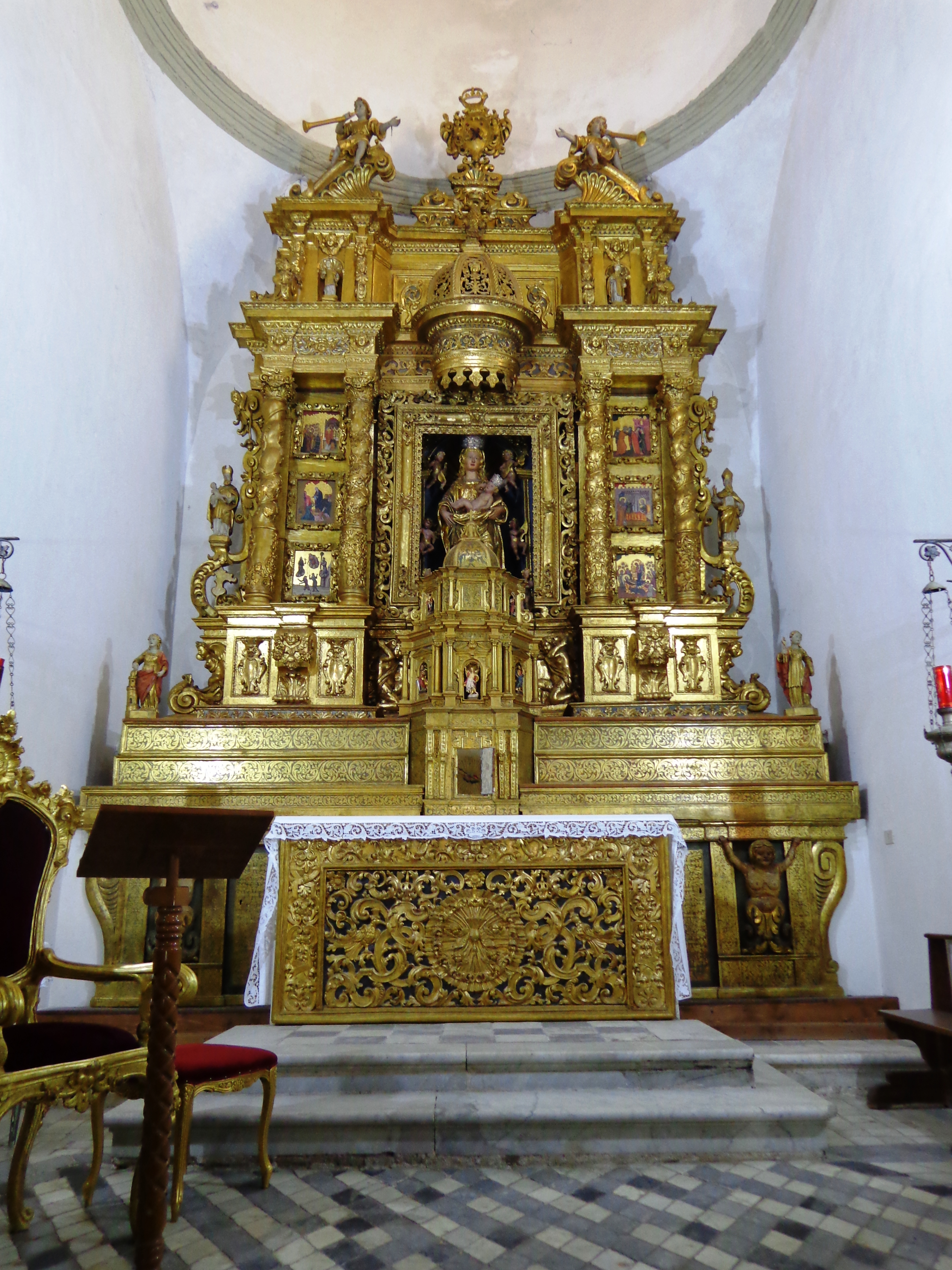 Castroreale_04_2014_11